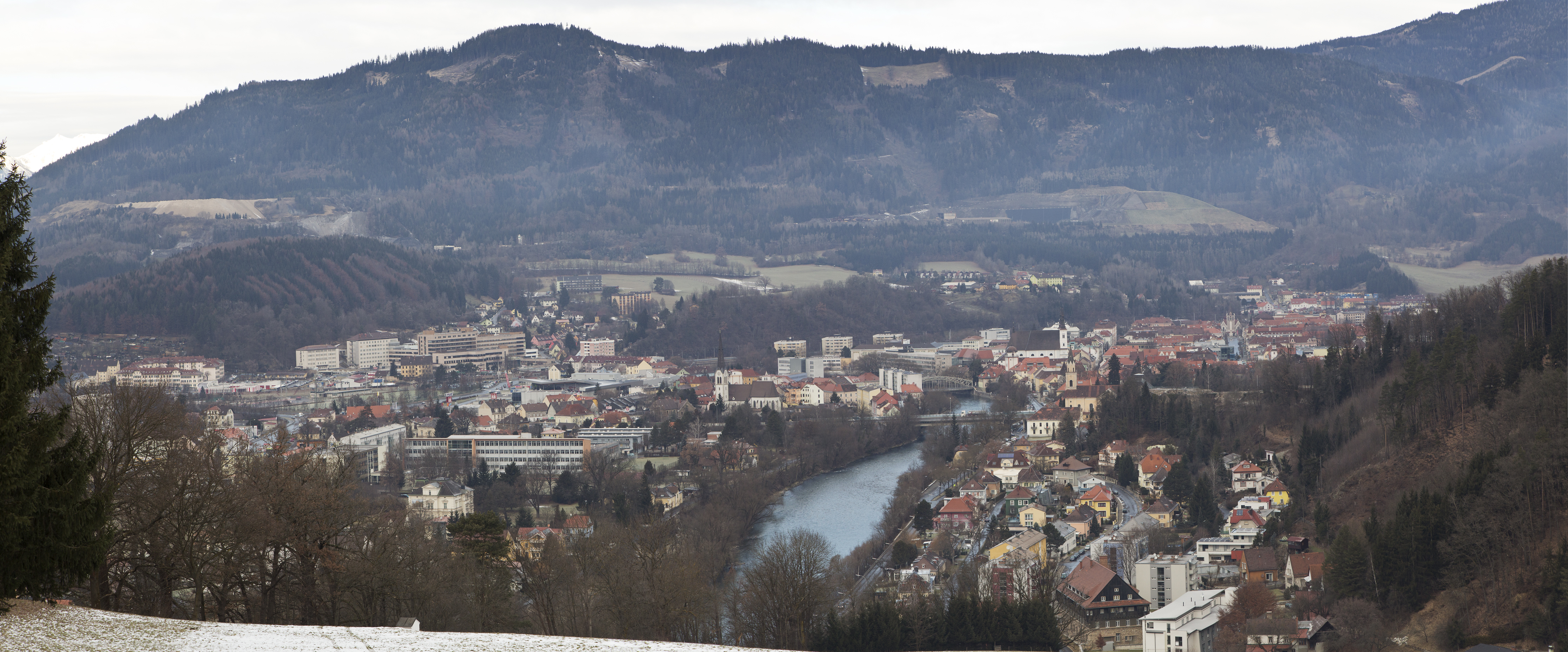 Blick vom Kalvarienberg nach Norden